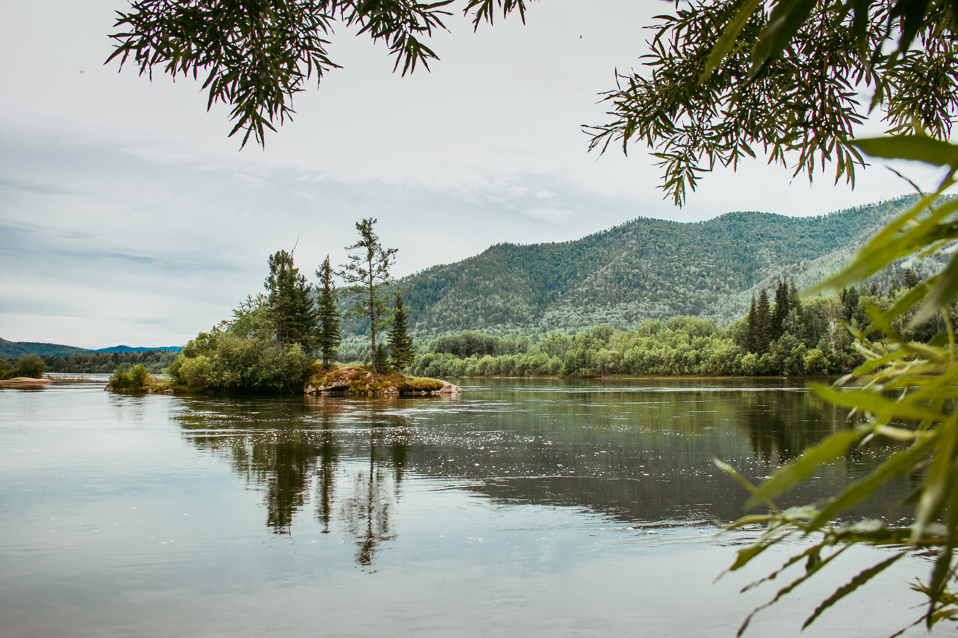 РТ, Каа-Хеский район